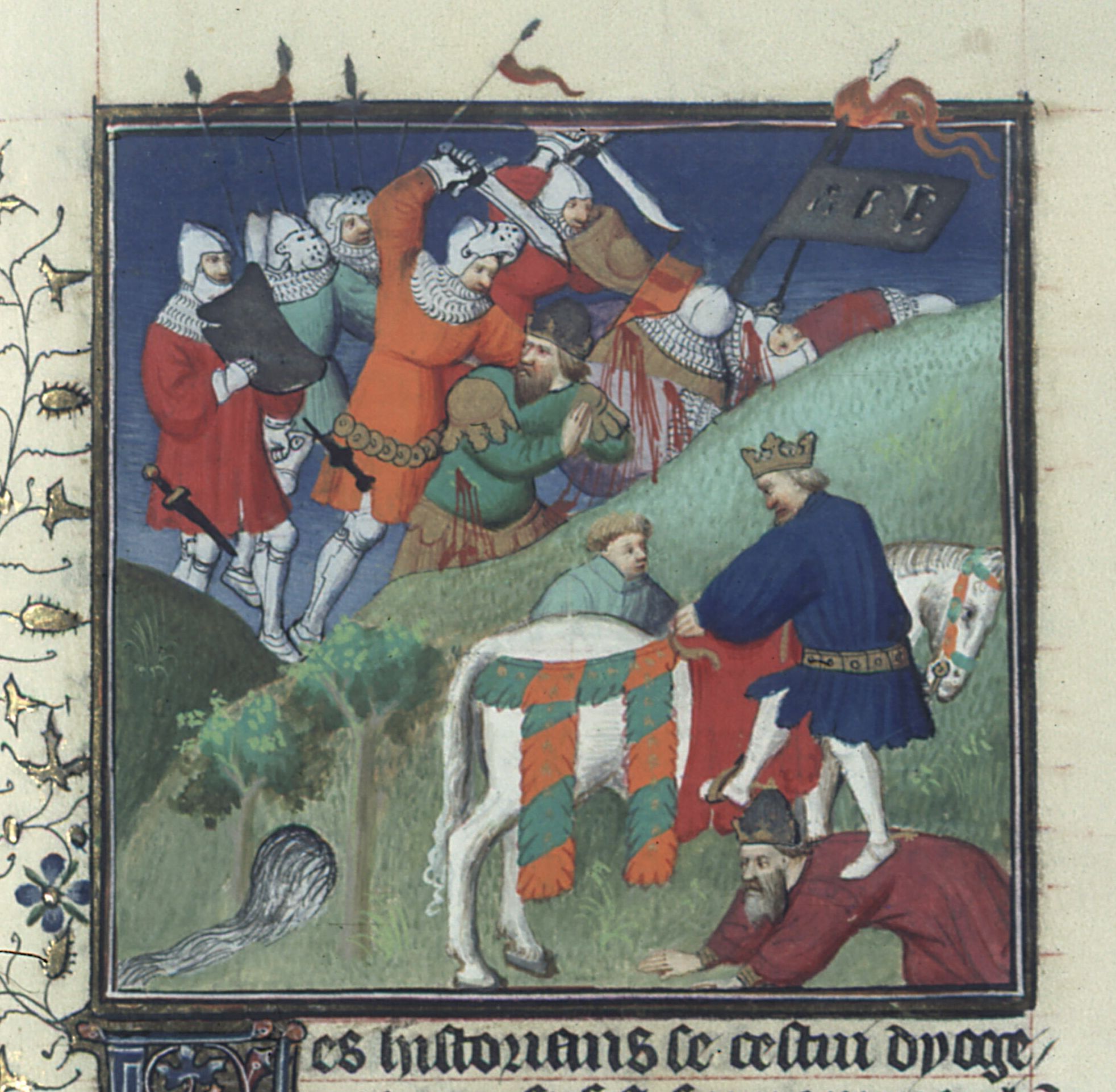 Romain IV et Alp Arslan lors de la Bataille de Malazgirt (1071). Boccace, De casibus (traduction Laurent de Premierfait), France, Paris, XVe siècle, Maître de Rohan et collaborateurs.